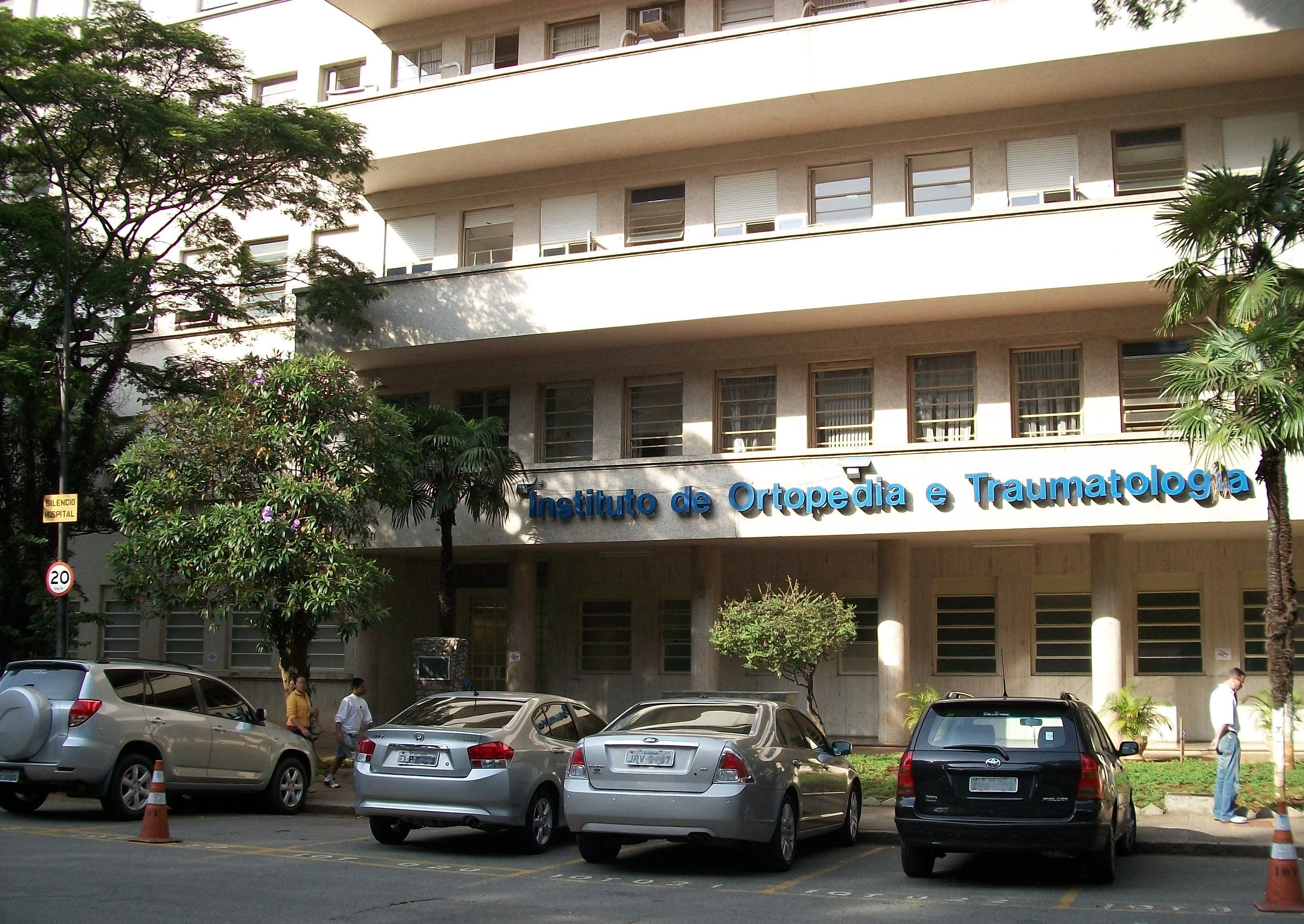 Fachada do Instituto de Ortopedia e Traumatologia do Hospital das Clínicas da FMUSP em abril de 2010.